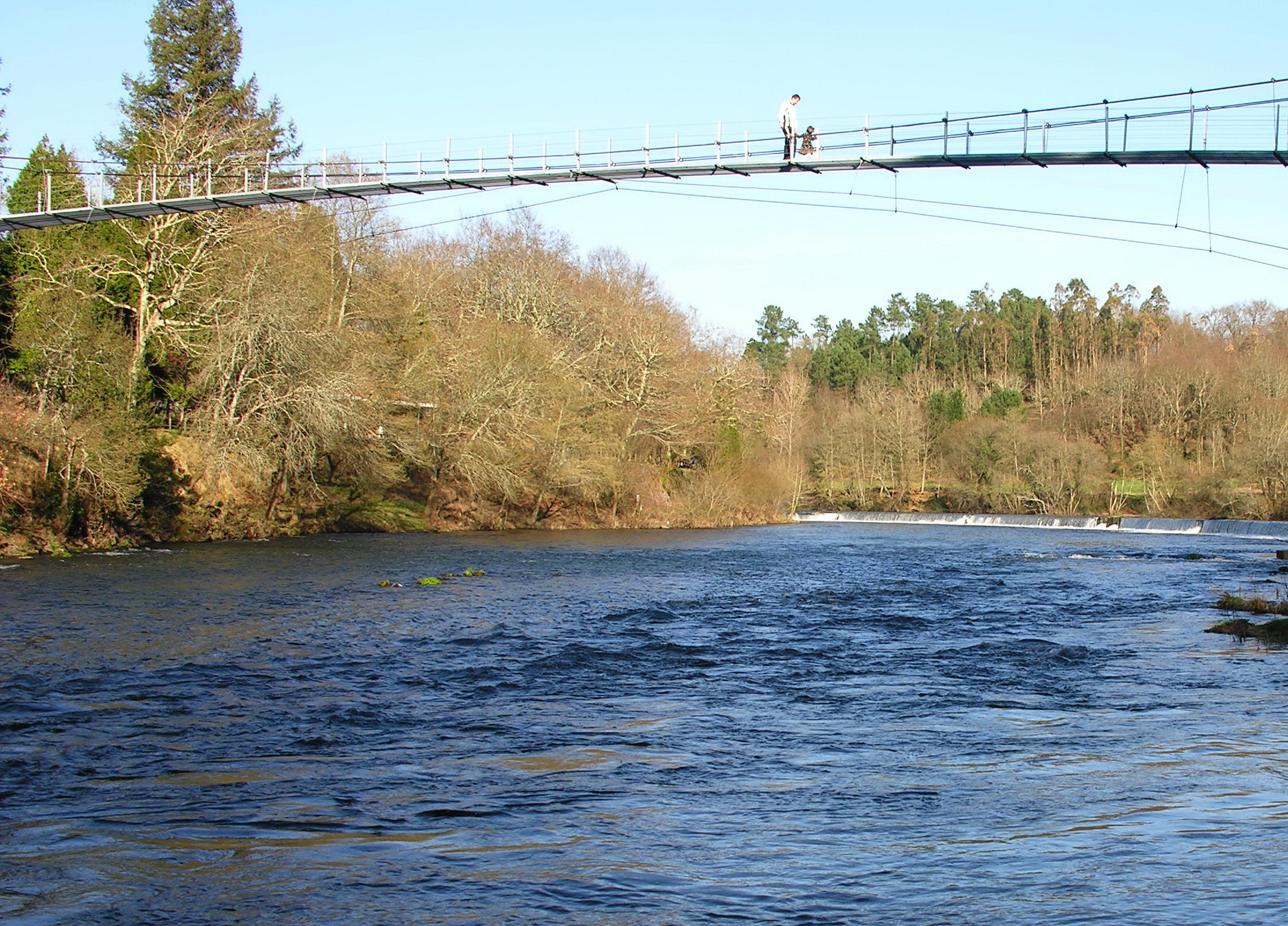 Xirimbao concello de Teo(Galicia